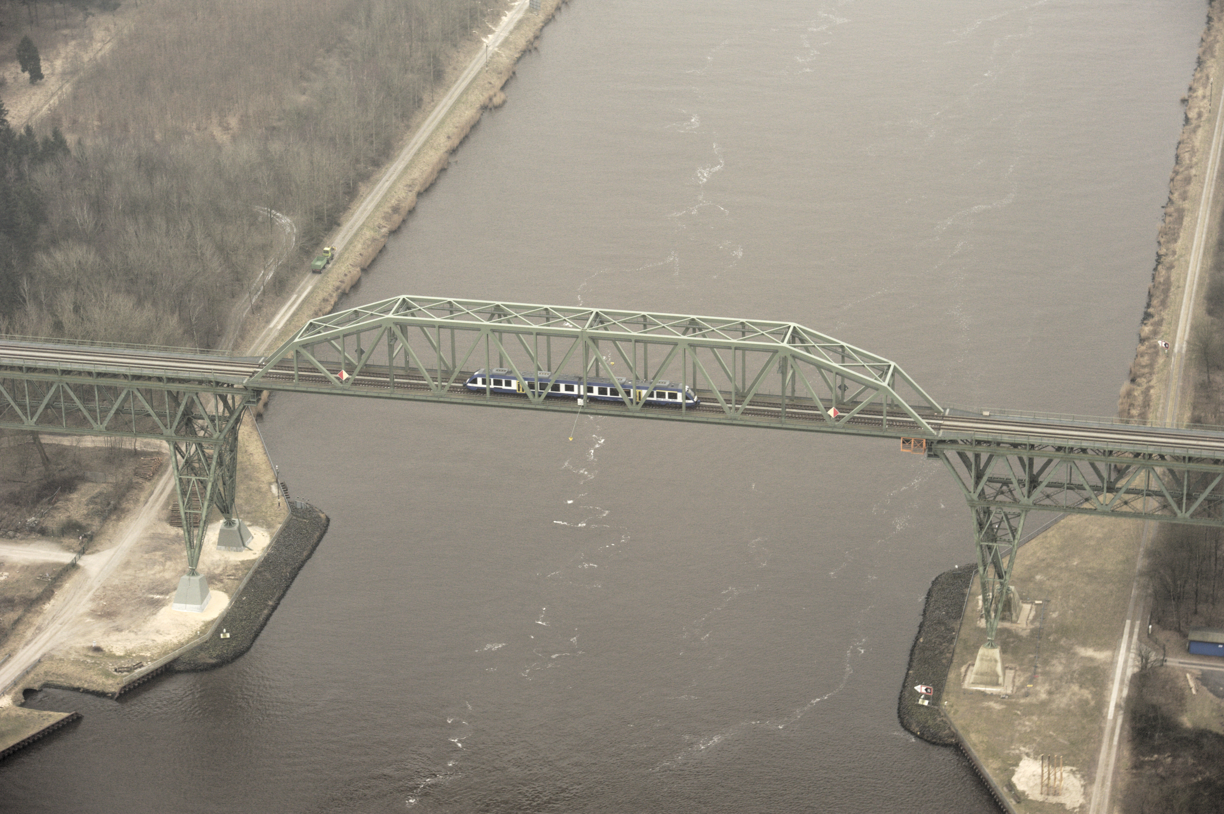 Die Marschbahn auf der Hochbrücke Hochdonn beim überqueren des Nord-Ostsee-Kanals.